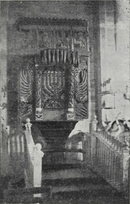 Беларуская (тарашкевіца): Высоцак (Vysocak). Сынагога